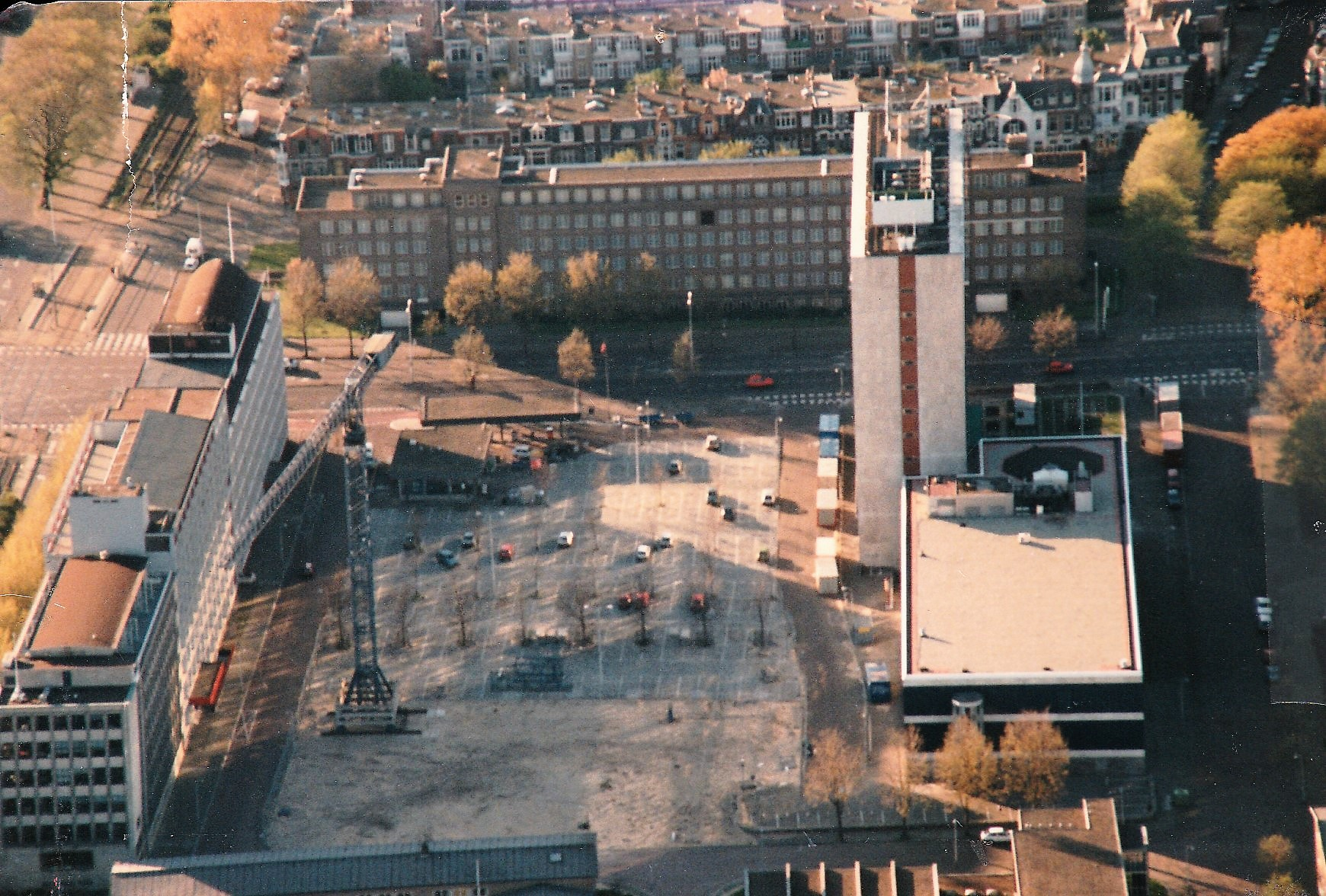 Vanuit een Cessna opgestegen van "Zestienhoven"